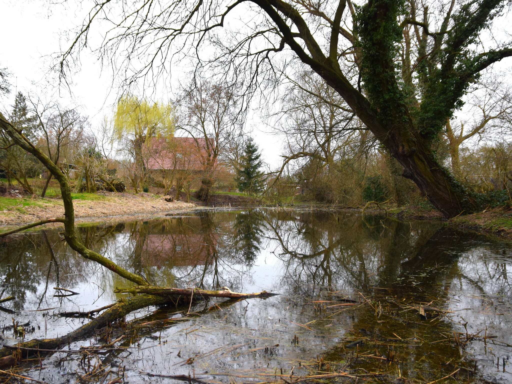 Kleiner Dorfsee in Frankfurt (Oder)-Lichtenberg